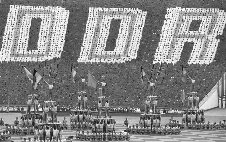 Leipzig, Turn- und Sportfest ADN-ZB/Koard/30.7.1977 Leipzig: Sportfest Die 1500 Mitglieder des Übungsverbandes der ASV "Vorwärts" gestalteten das Abschlußbild ihrer Vorführungen zur Sportschau im Leipziger Zentralstadion unter der Losung "Stärkt unsere DDR".